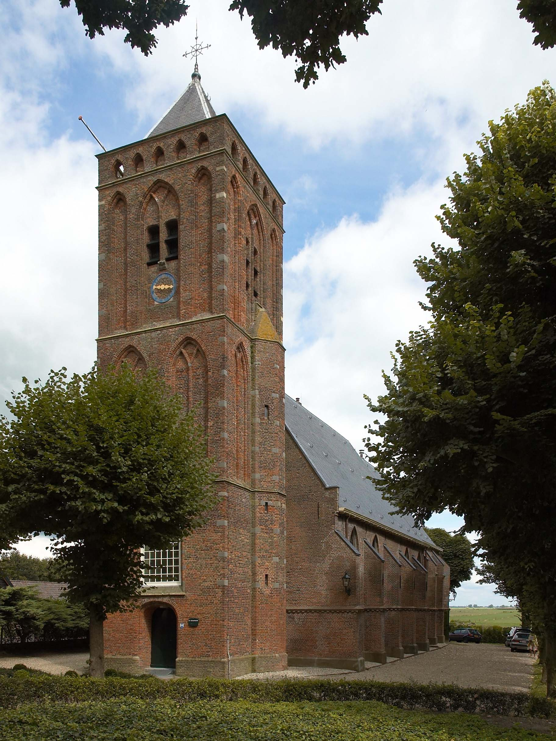 Kerkgebouw het "Dikke Torentje", Wakkerendijk te Eemnes, Nederland.